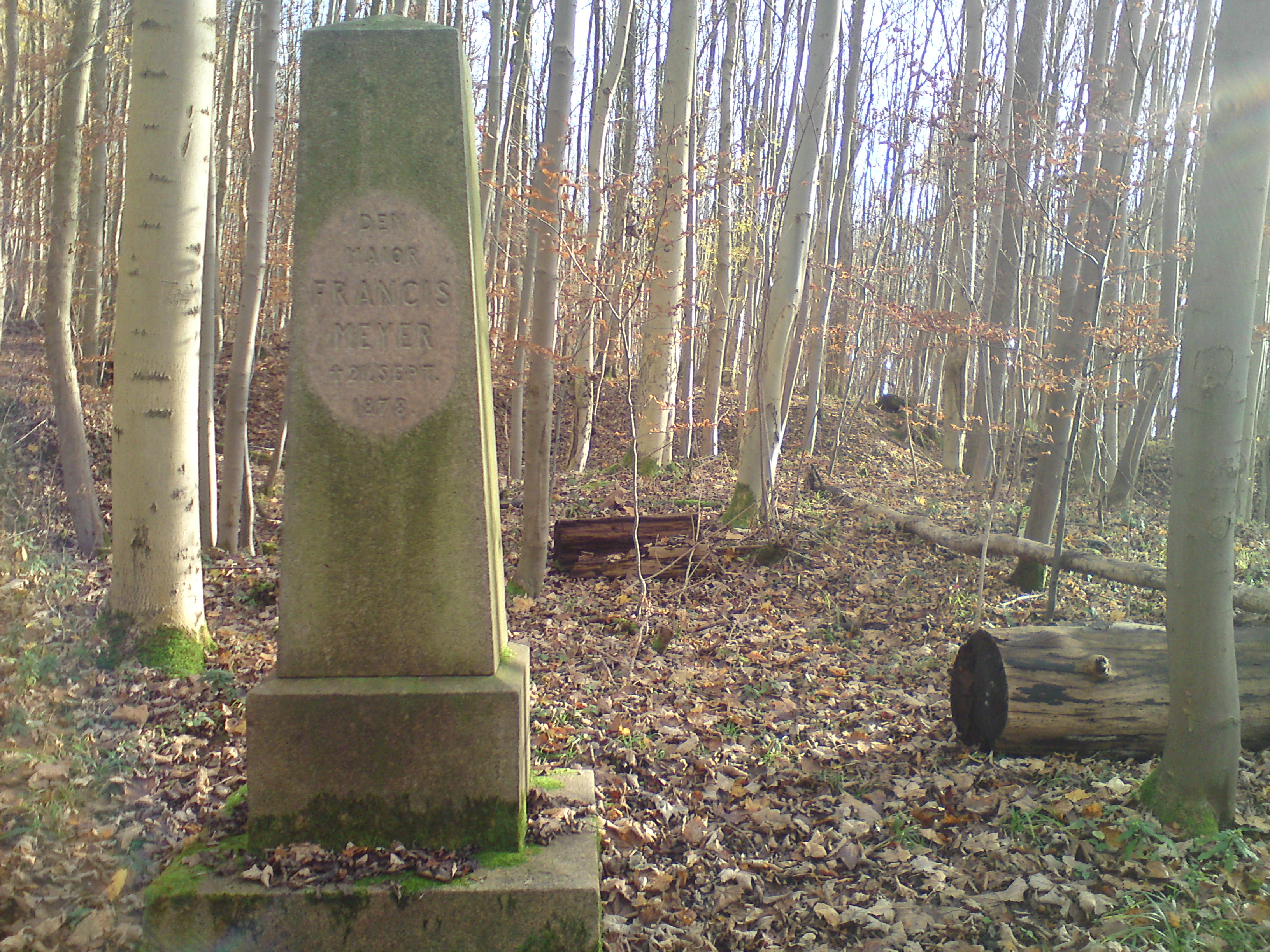 Das Denkmal des Herzbergers Major Francis Meyer unweit des Karstwanderwegs mit einem tiefen Loch im Hintergrund